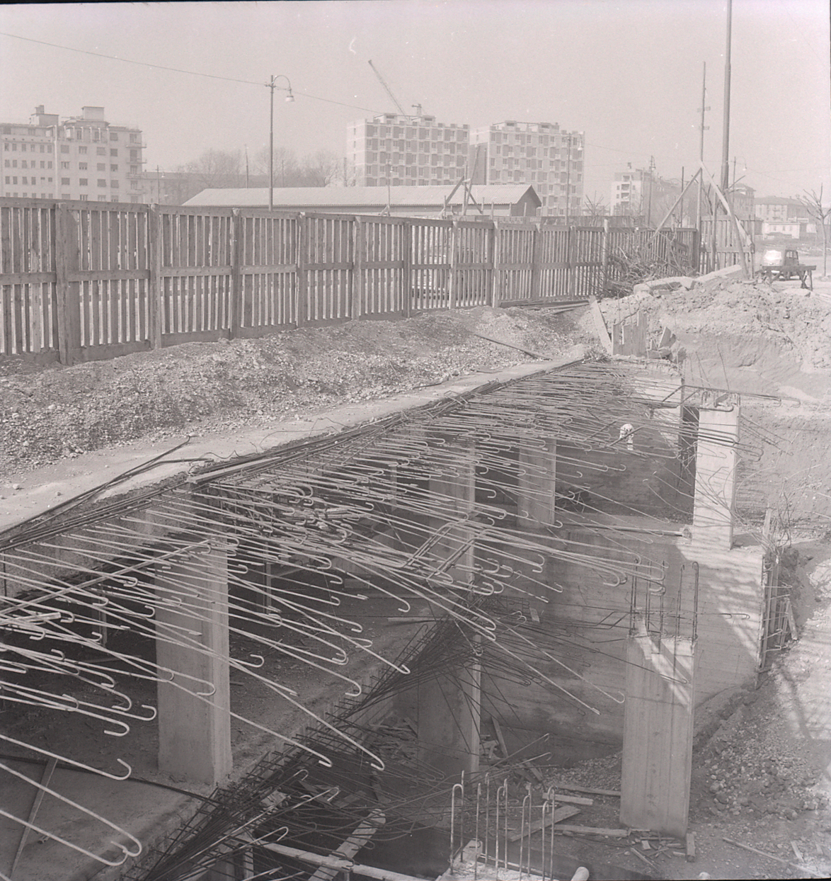 Serie fotografica : Milano, 1960 / Paolo Monti. - Buste: 20, Fototipi: 20 : Negativo b/n, gelatina bromuro d'argento/ pellicola ; 6x6, 6x9. - ((Serie costituita da 20 negativi identificati con i nn.: 7931-7950. La suddetta serie è contenuta nella scatola identificata con la numerazione R7851-8008. Sul coperchio della scatola manoscritto: "13 - Milano". Sulla busta 7645 manoscritto: Vecchio ponte via Gioia". - Via Melchiorre Gioia